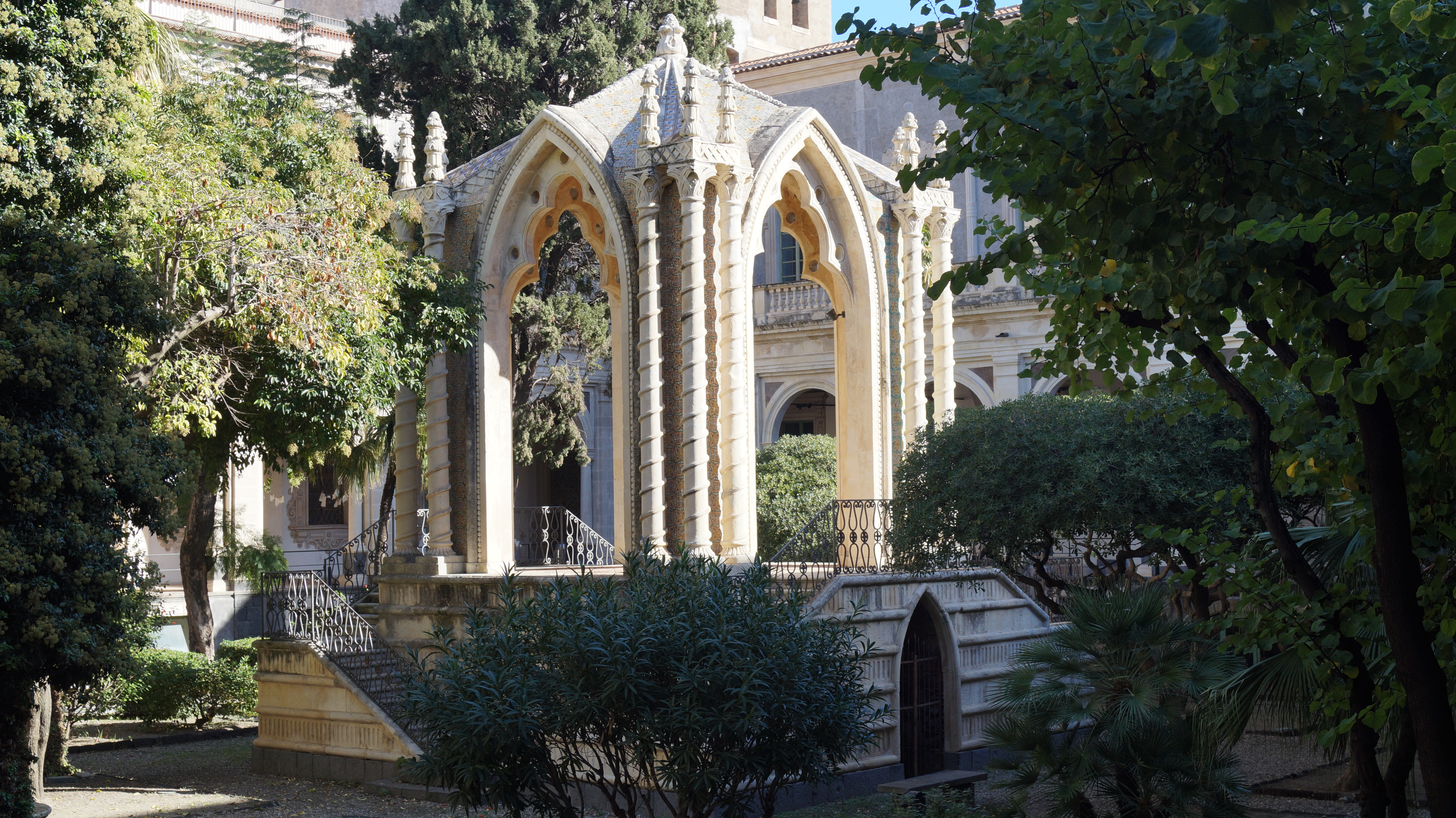 caffeaus nel chiostro di levante del monastero di san nicolò l'arena